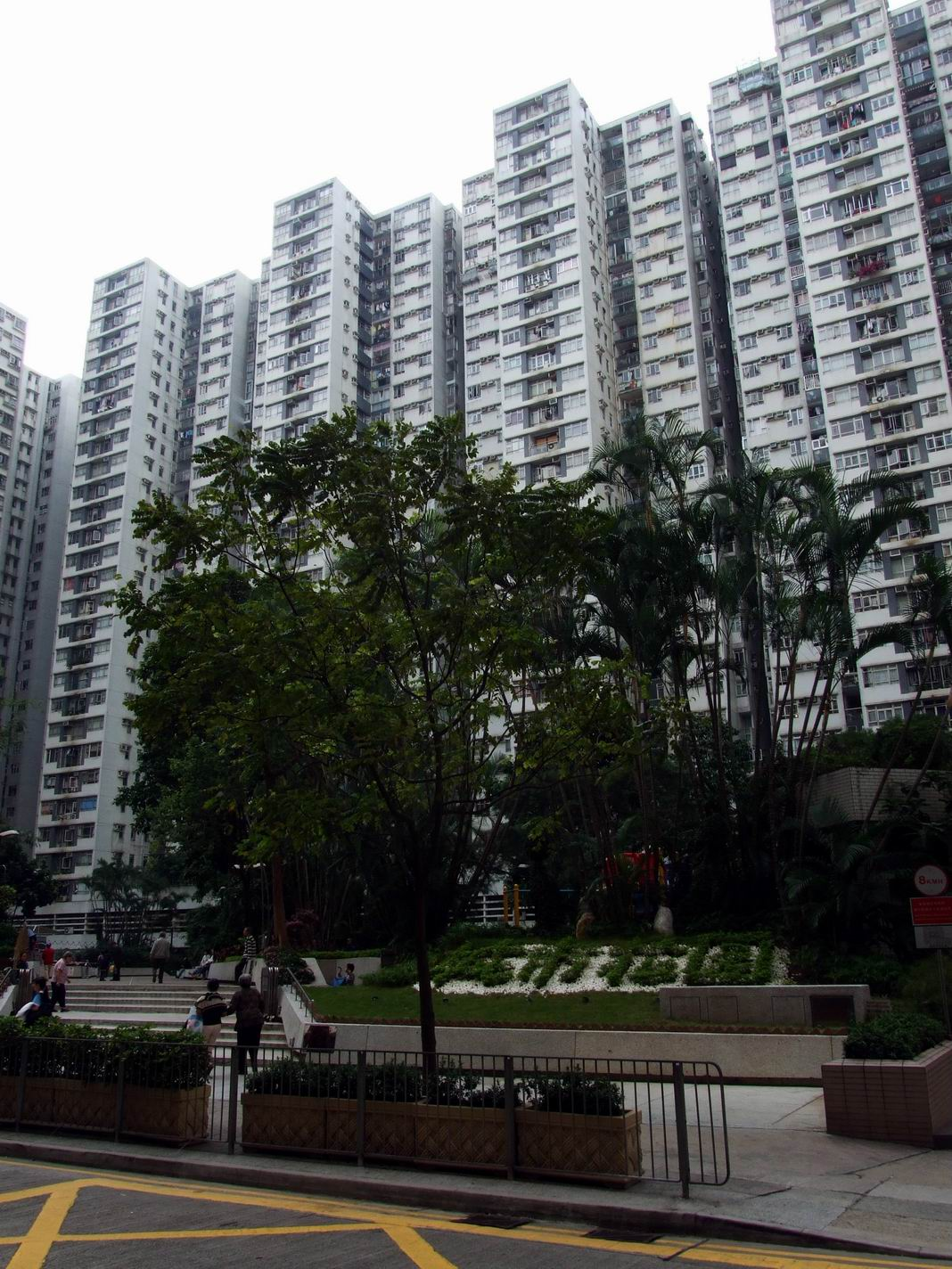 城市花園